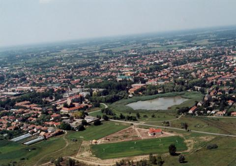 Lajosmizse, Hungary, aerialphotography